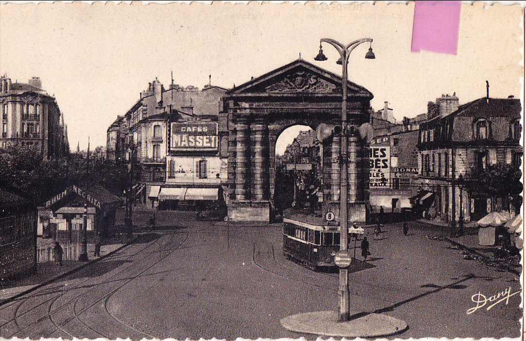 Place de la Victoire bordeaux